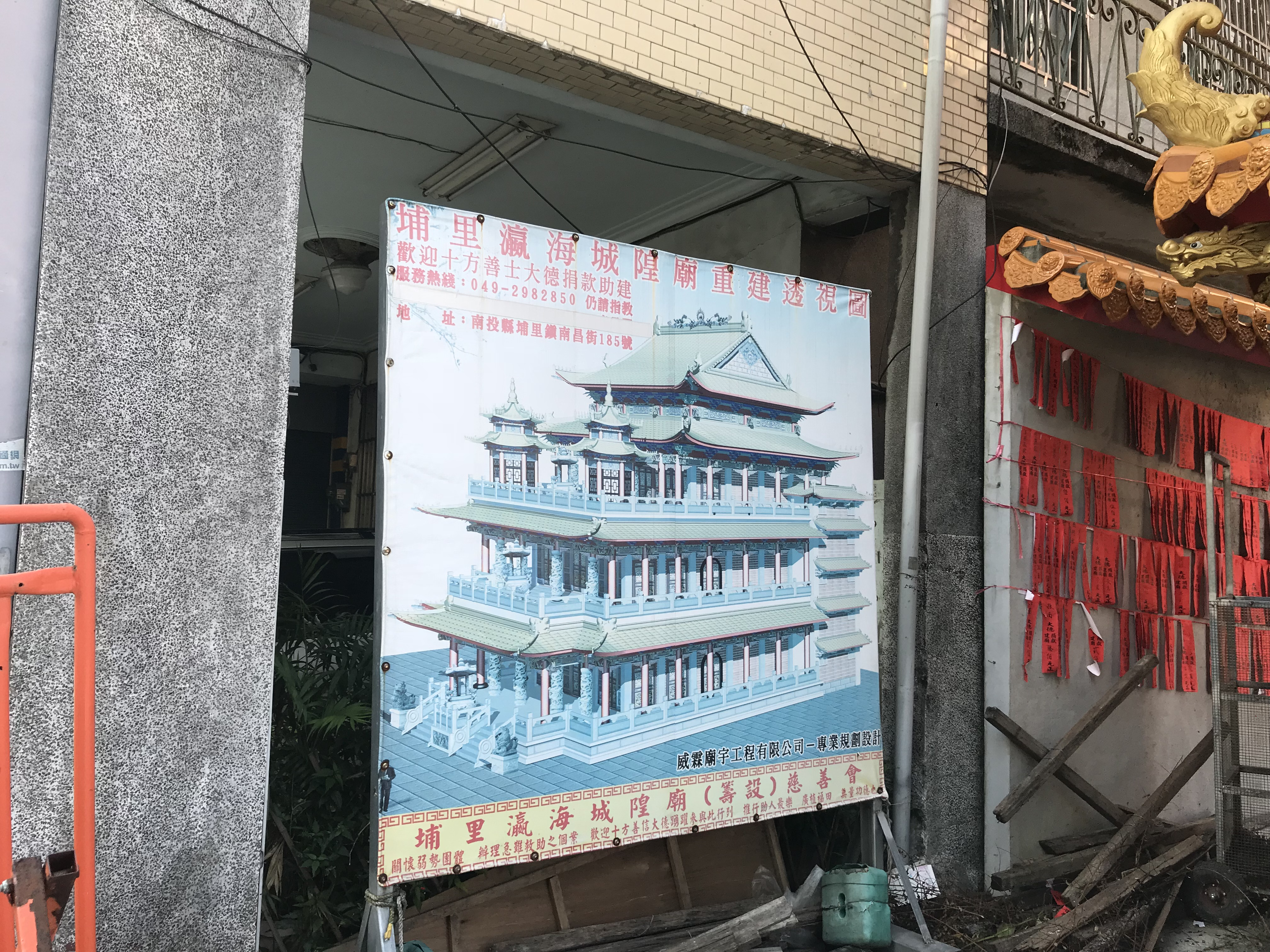 中文（台灣）: 埔里瀛海城隍廟重建透視圖